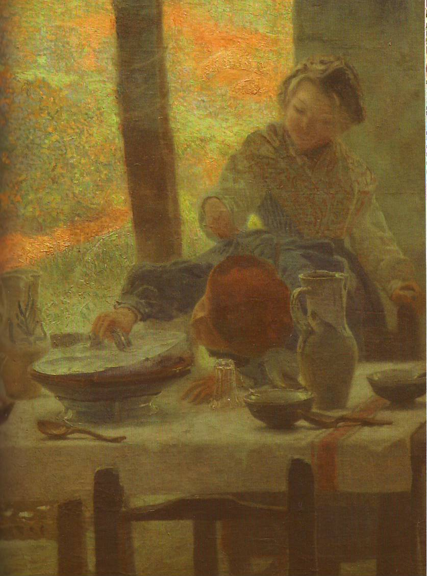 Detalle de la mesa con loza blanca del Norte de España, en el óleo titulado Cristiano, pintado en 1897 por Guinea. Conservado en el Palacio Foral de Bilbao.